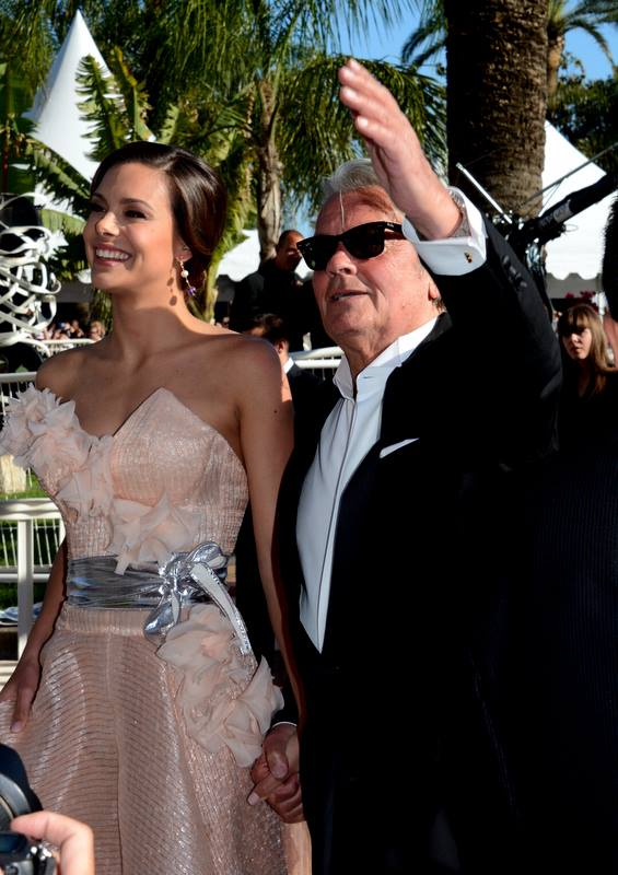 Marine Lorphelin et Alain Delon au festival de Cannes